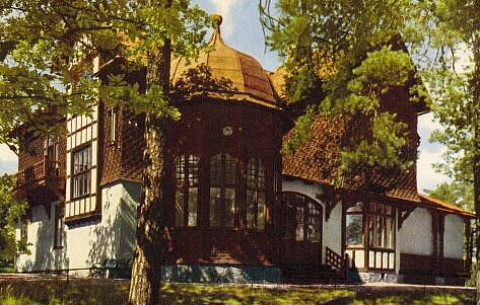 Villa Bikupan, Saltsjöbaden